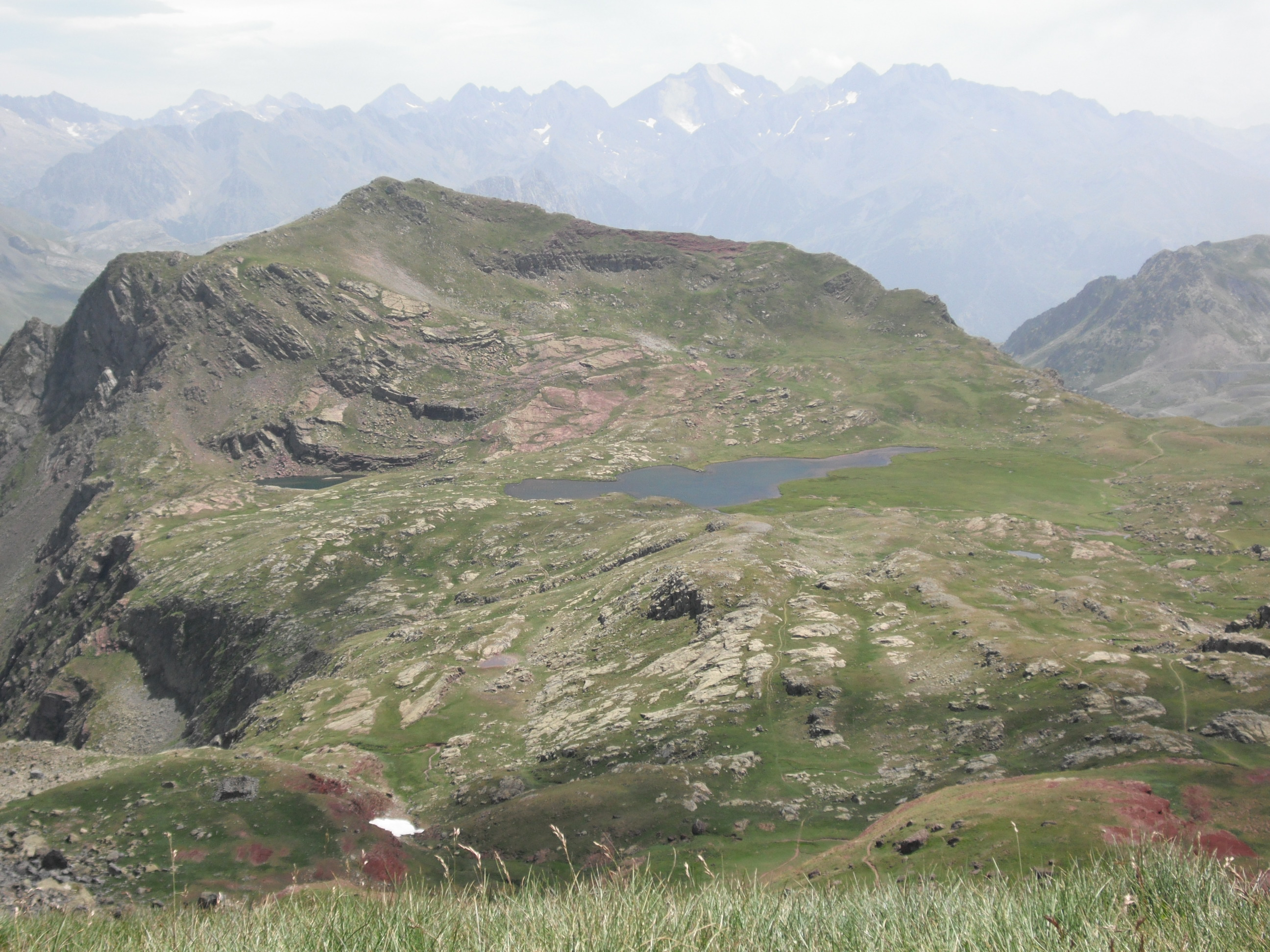 Vista de los ibones de Anayet desde el collado de Anayet.